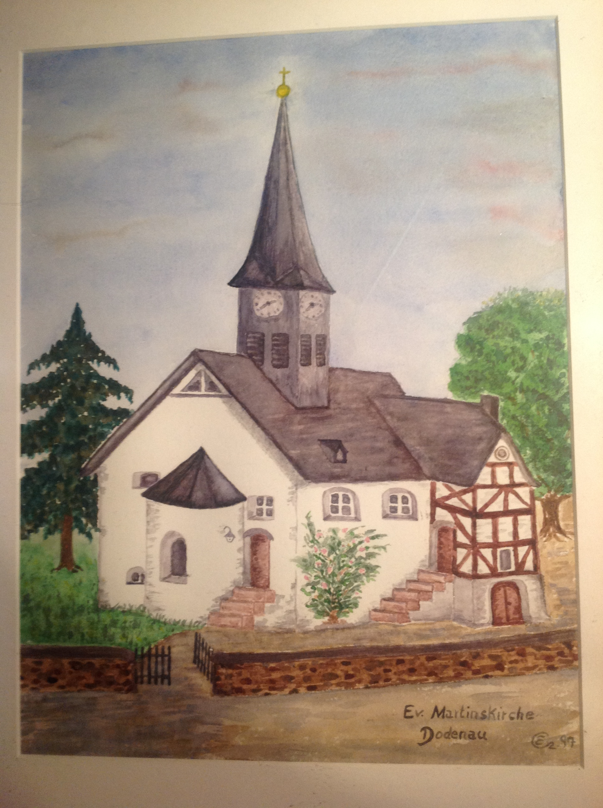 Werk von Elfriede Czukta geb. Klein